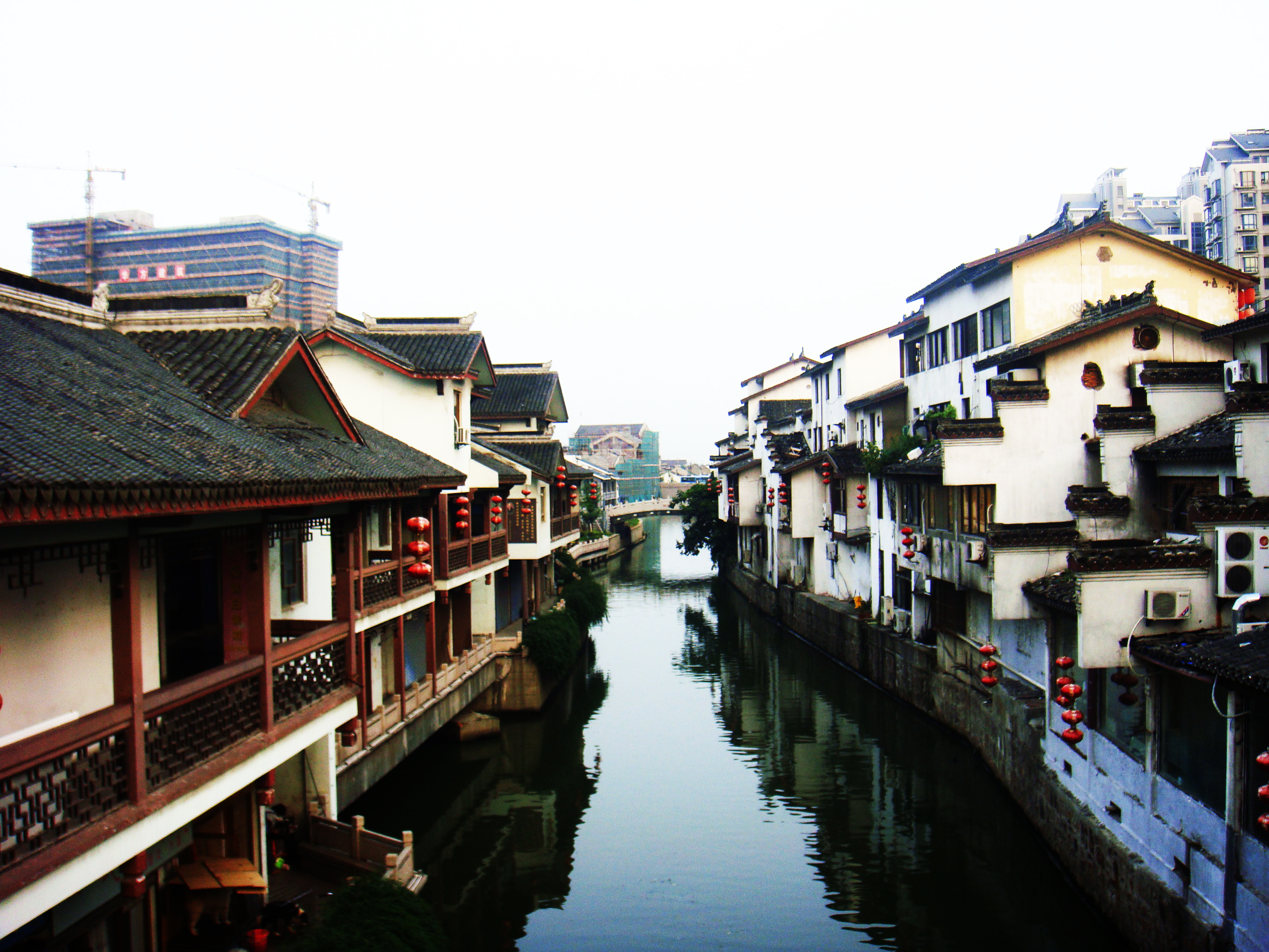 中文（中国大陆）: 南禅寺，京杭运河